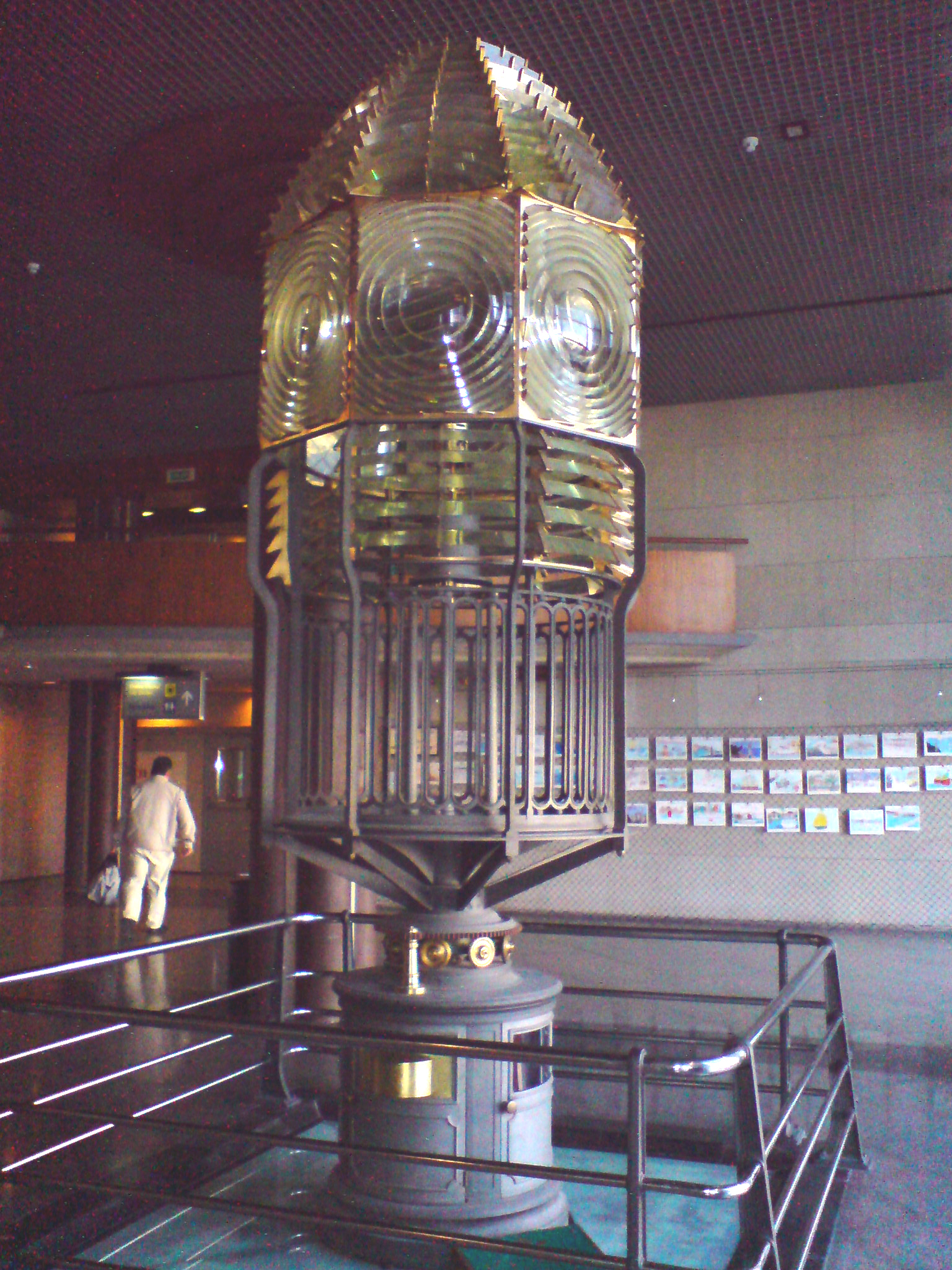 Antiguo aparato óptico y de iluminación del Faro de Punta Cumplida (La Palma) que fue restaurada en 1992 por la Autoridad Portuaria de Tenerife y se exhibe desde entonces en la terminal de pasajeros del puerto de Santa Cruz de Tenerife.